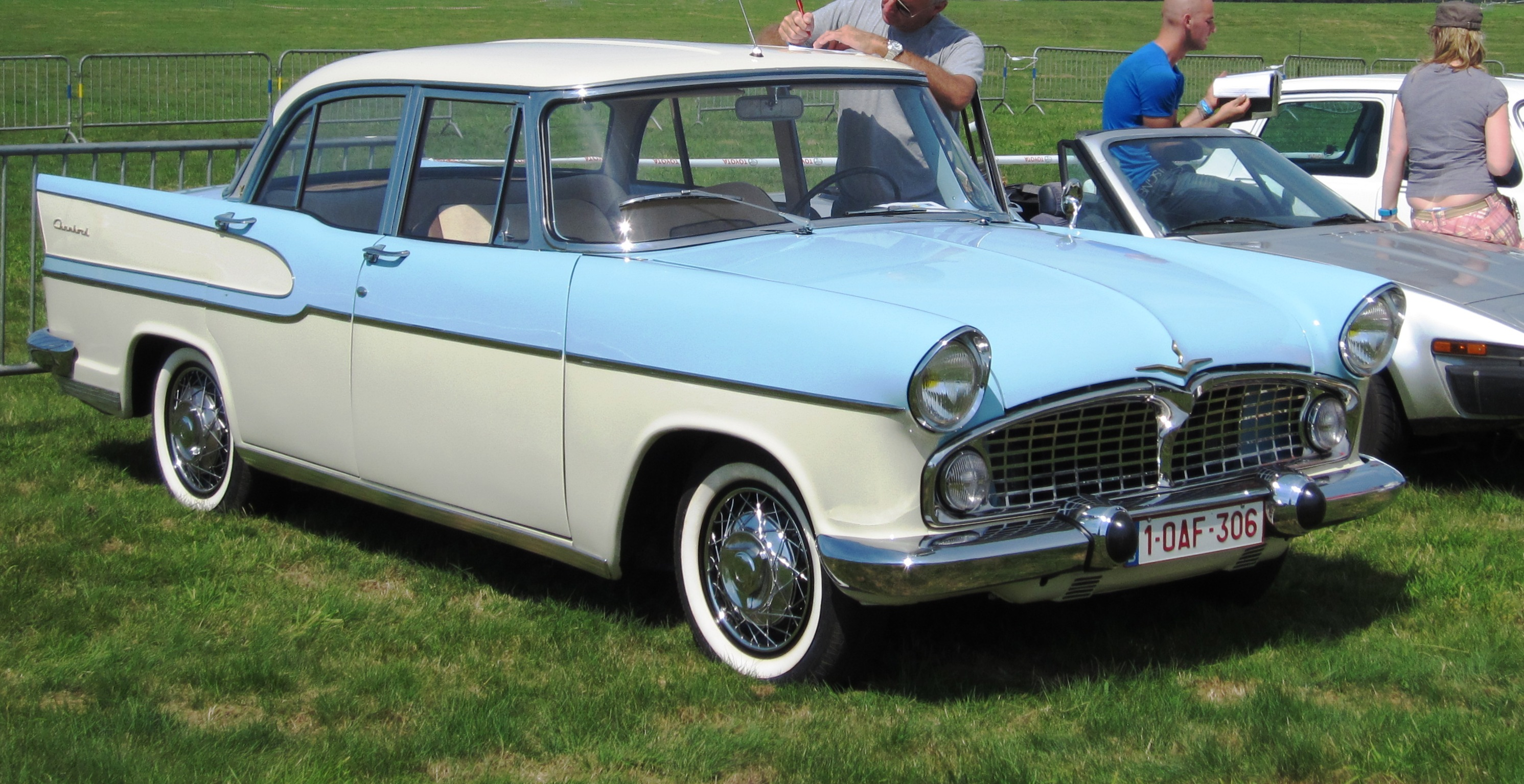 Simca Chambord en Belgique